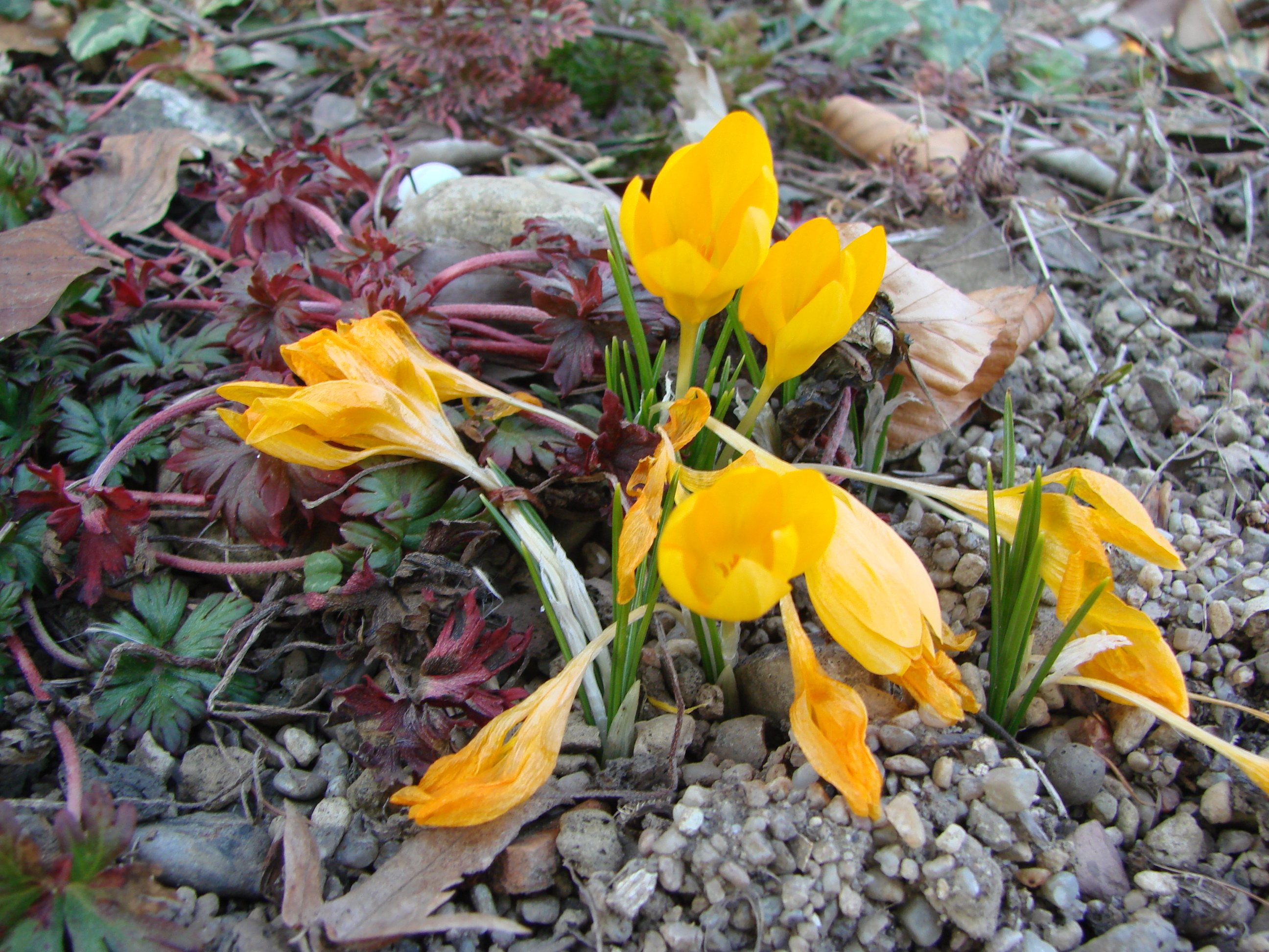 Jardin botanique de l'Université de Zurich (Suisse) : Crocus ancyrensis G. Maw